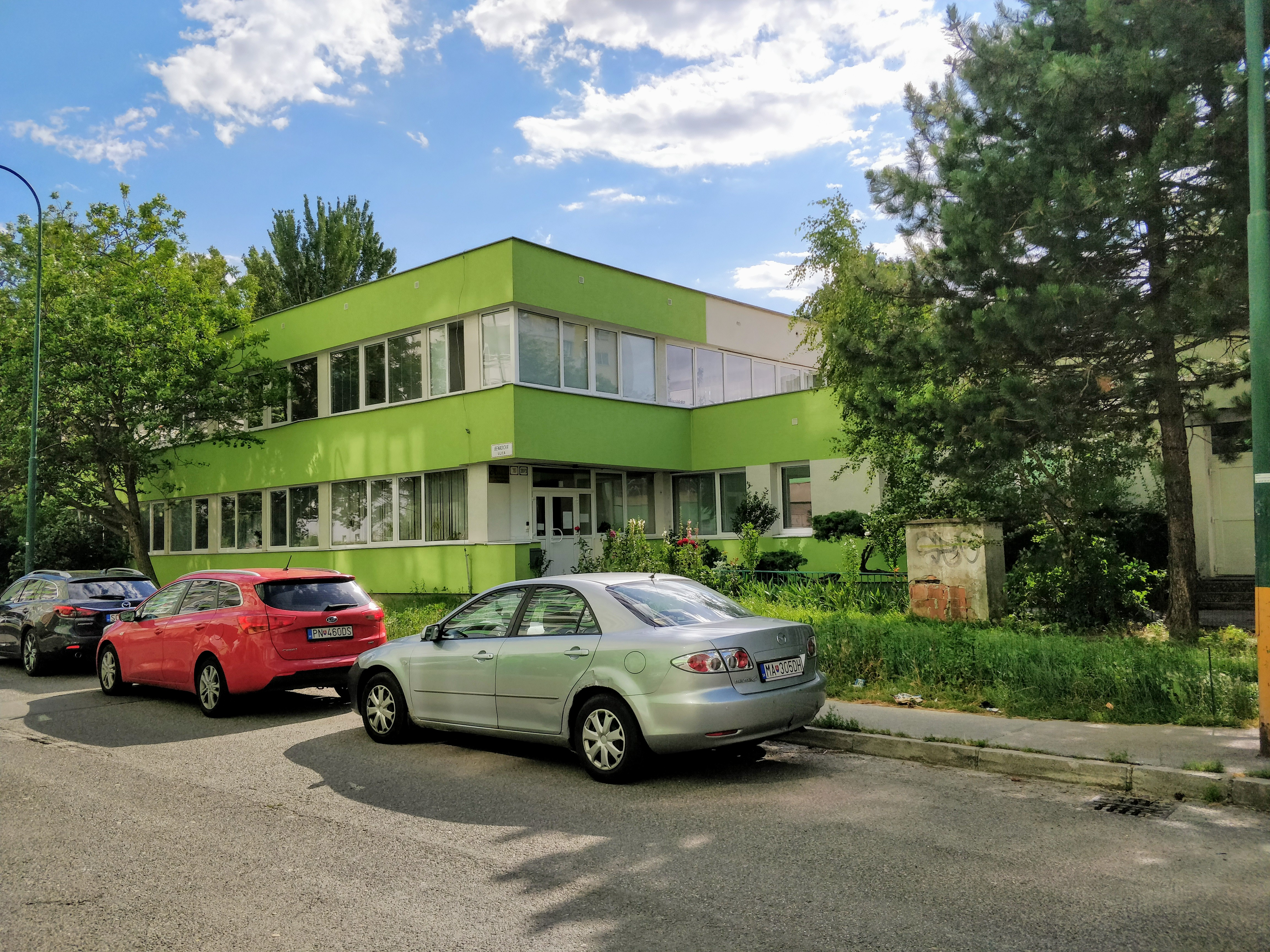 Beňadická 16, Bratislava, Slovakia